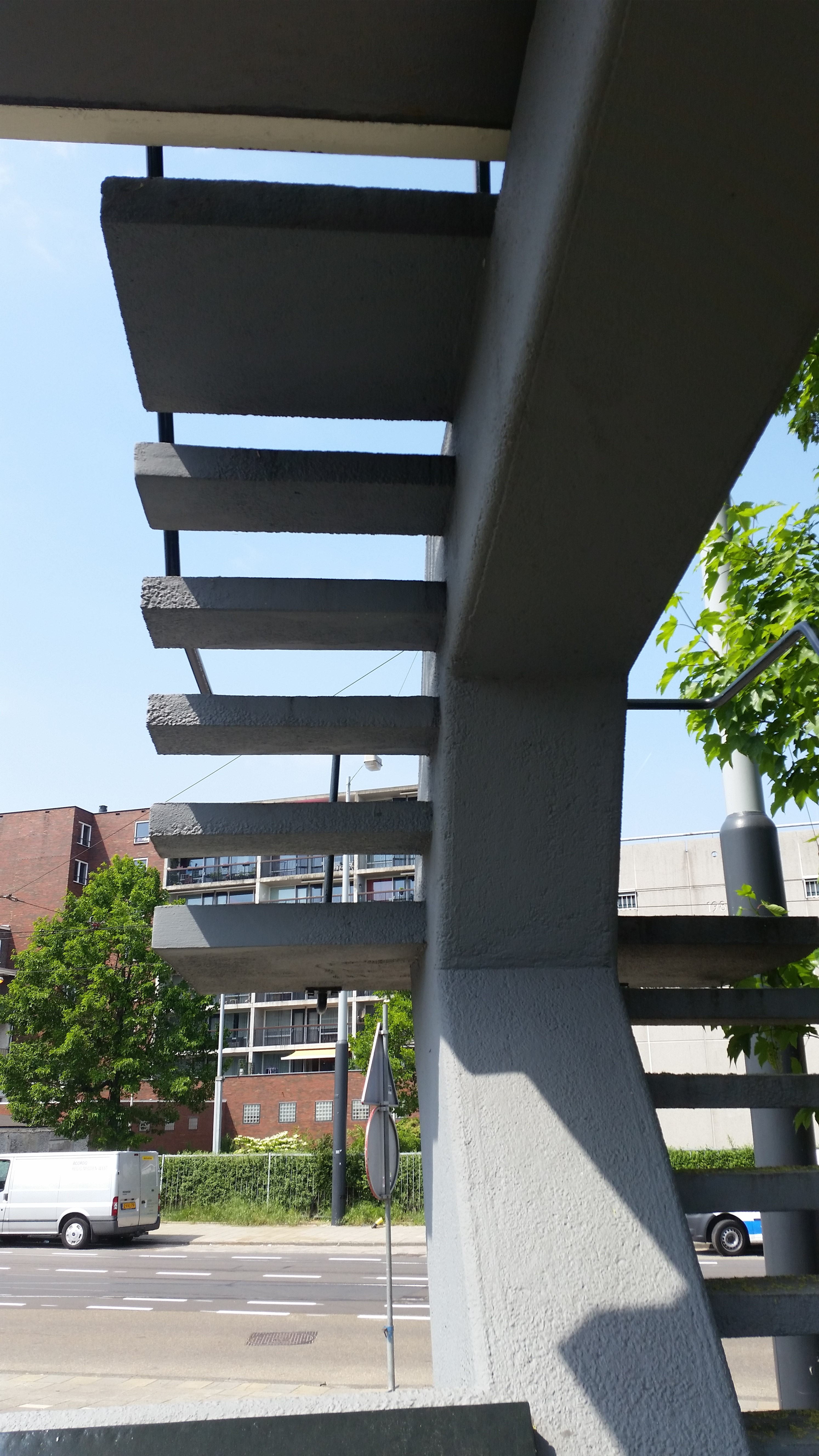 Duiventil van Slebos aan de Havenstraat, Amsterdam